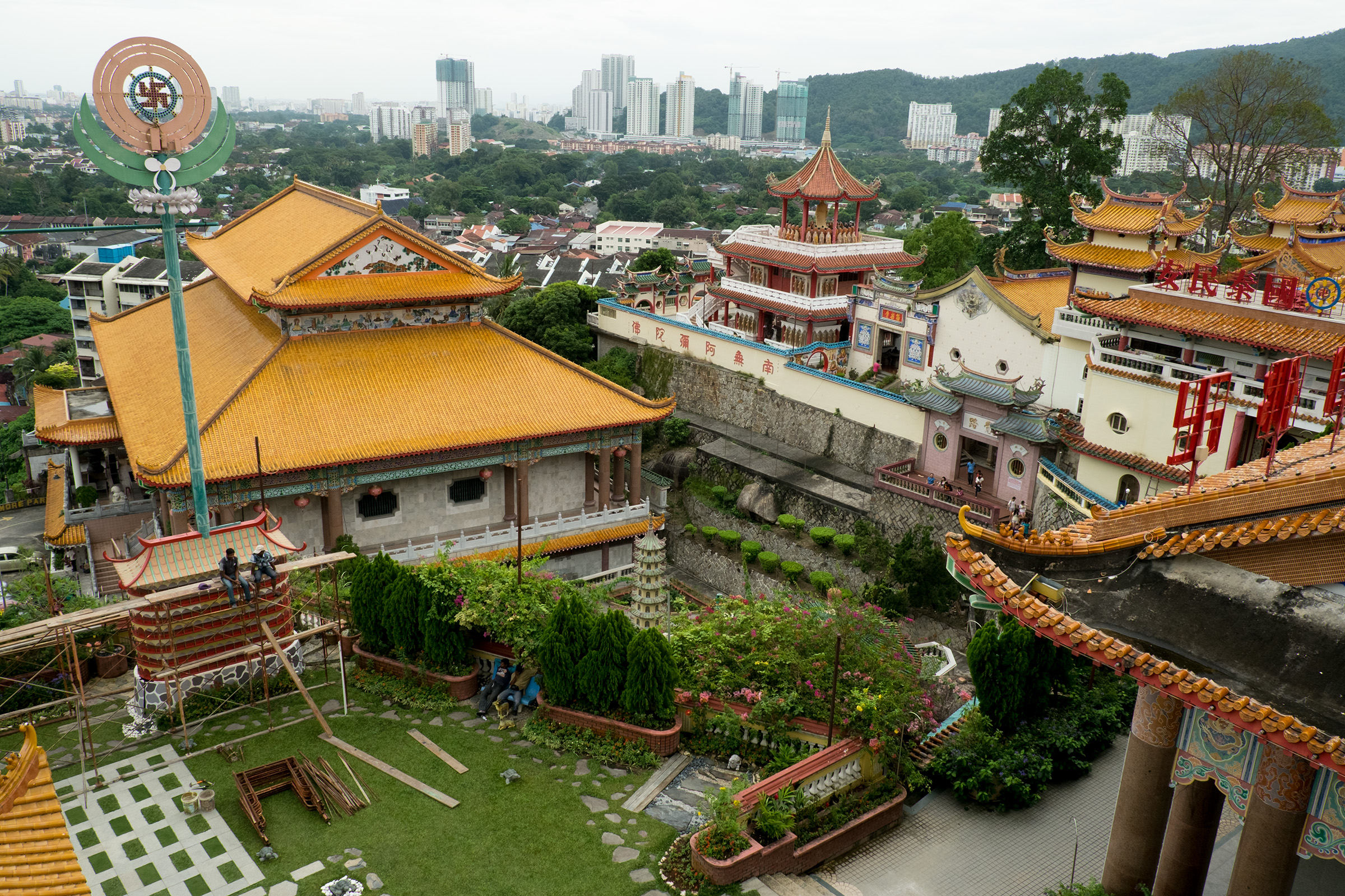 Ke Lok Si Temple